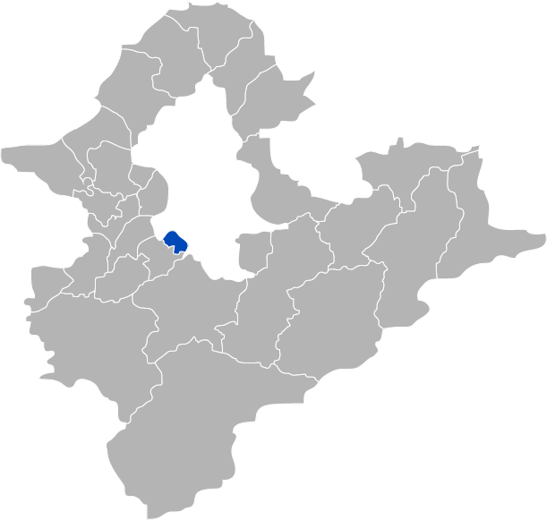 KaurJmeb為編寫中華民國臺灣省臺北縣永和市，於2005年2月6日所繪。